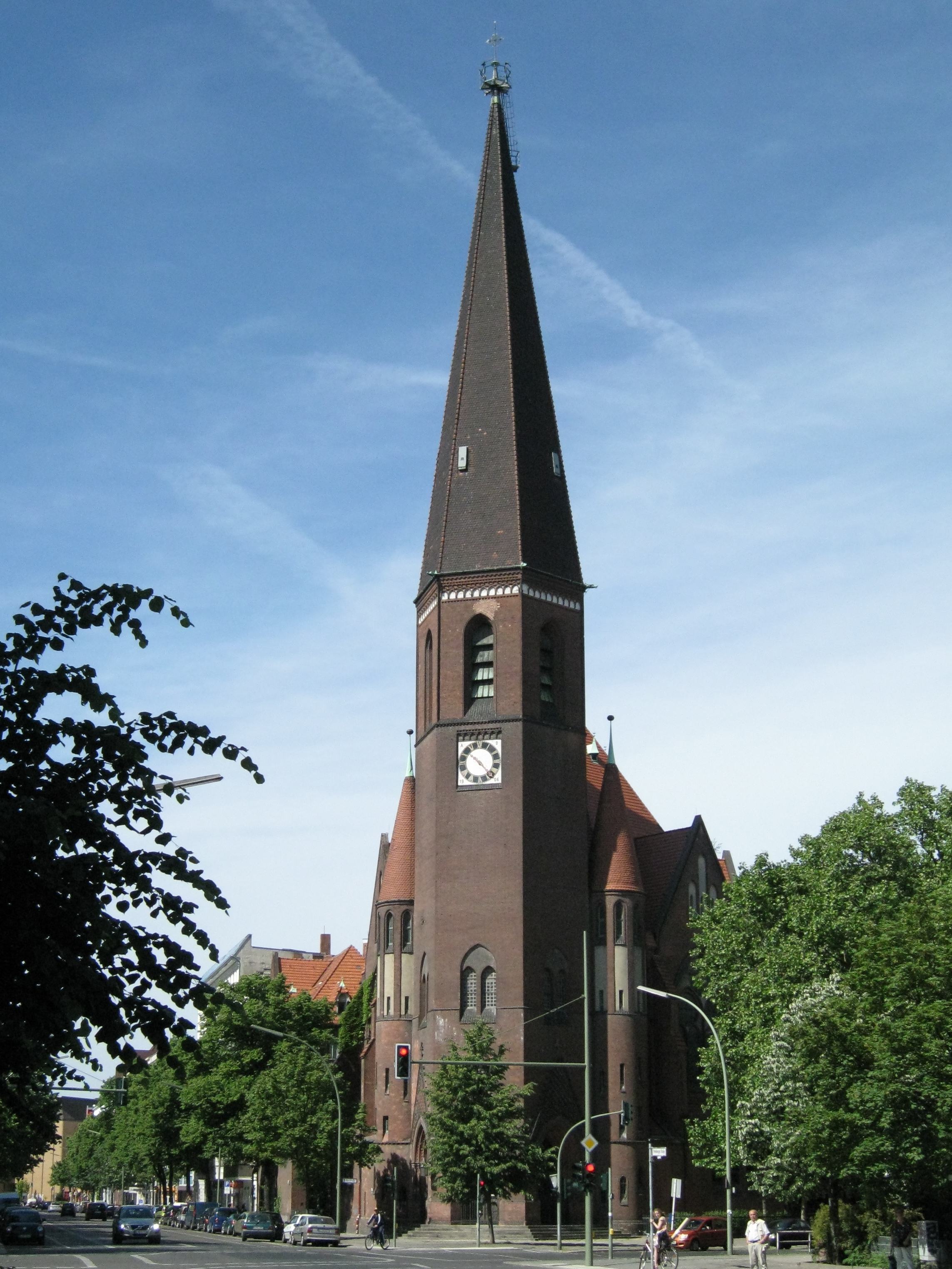 Heilige-Geist-Kirche in Berlin-Moabit, Turm mit Portal